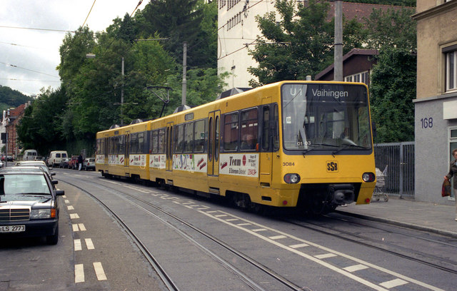 Stadtbahn on the street in Stuttgart (Bihlplatz)